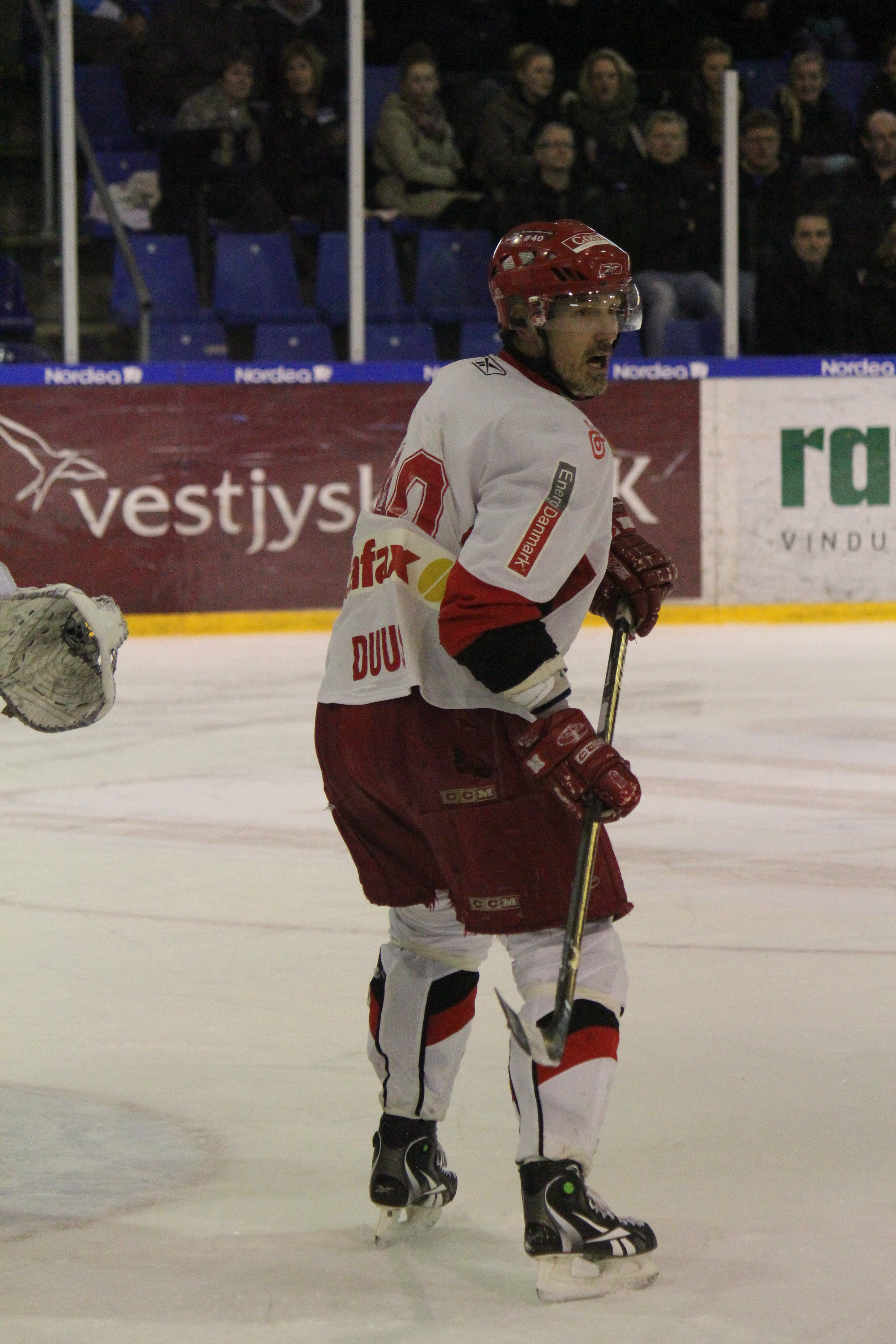 Jesper Duus under kamp mellem Herning Blue Fox og Rødovre Mighty Bulls - 15/3-11. Herning vandt kampen 4-0